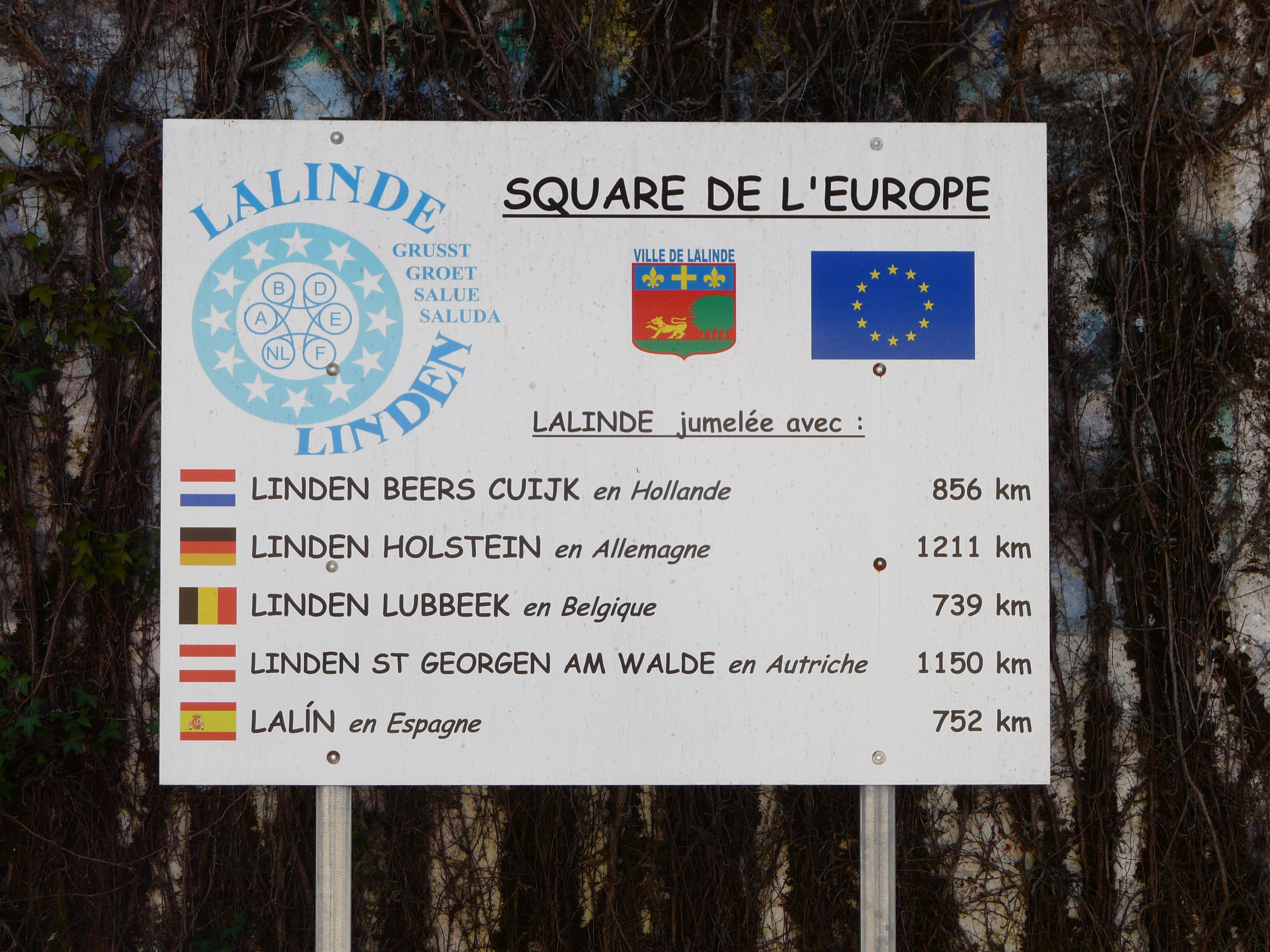 Panneau de jumelage de Lalinde, Dordogne, France.